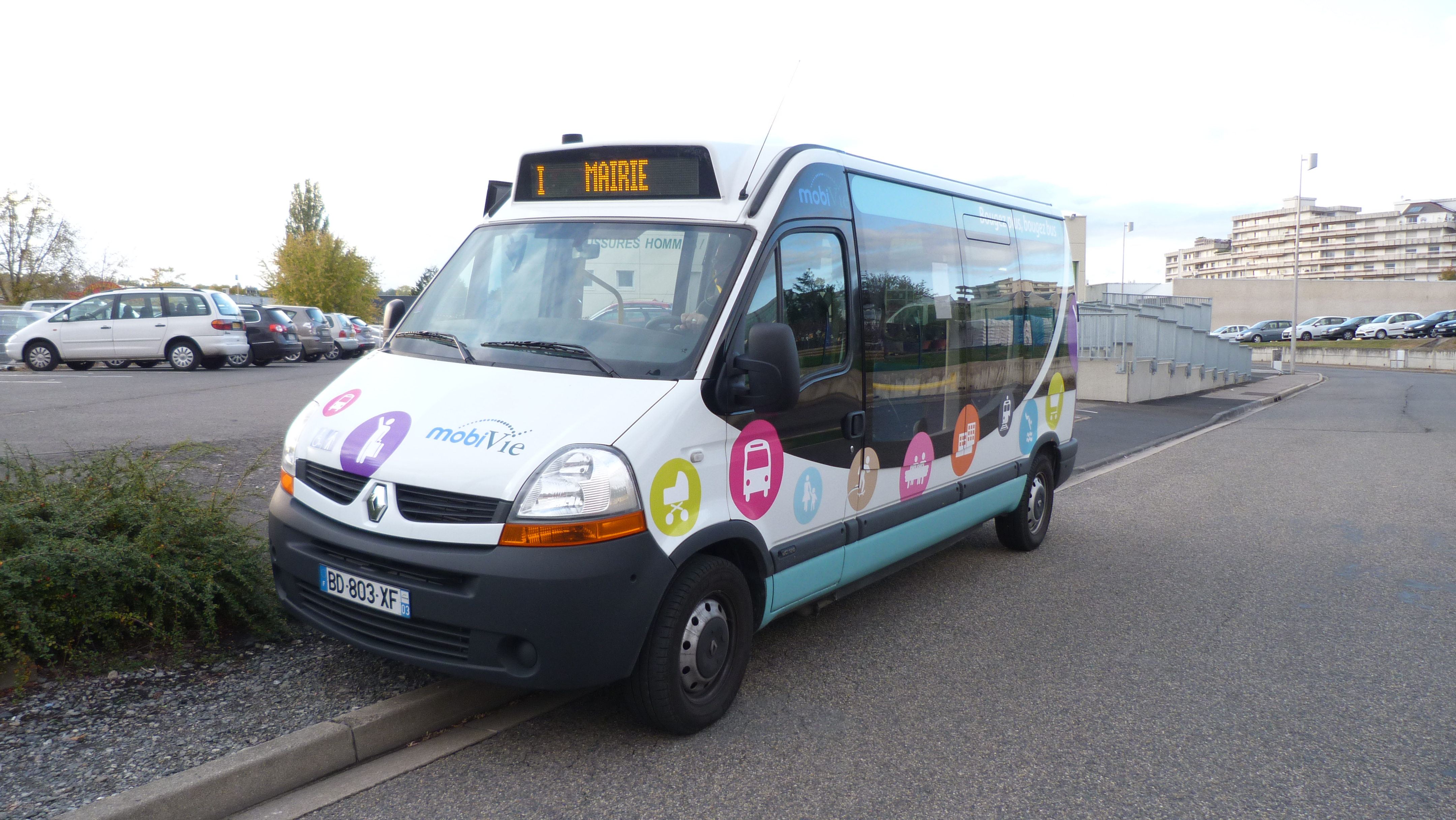 Dietrich Noventis 420 n°65 du réseau MobiVie de Vichy sur la ligne I.